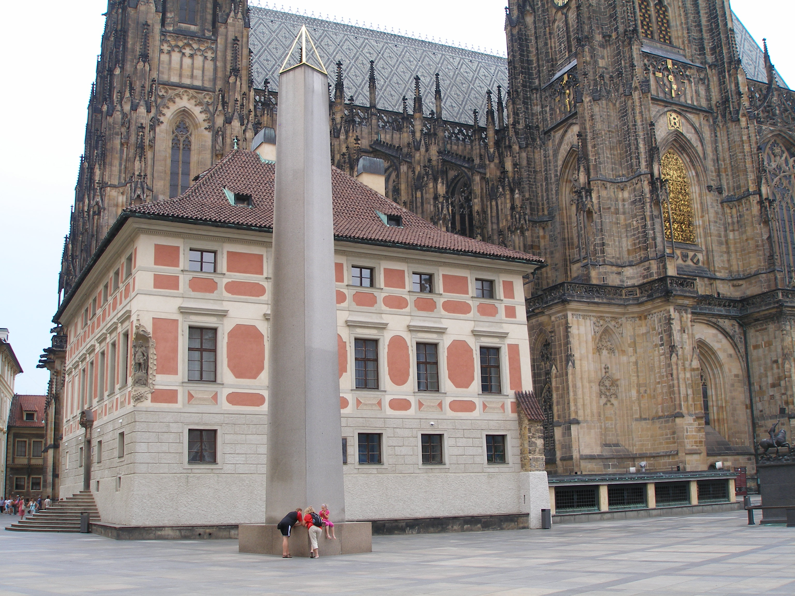 Obelisk na třetím nádvoří Pražského hradu.